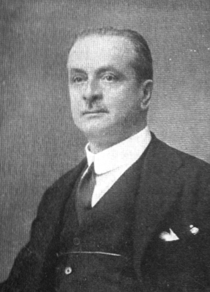 L'industriale bustocco Giuseppe Borri.